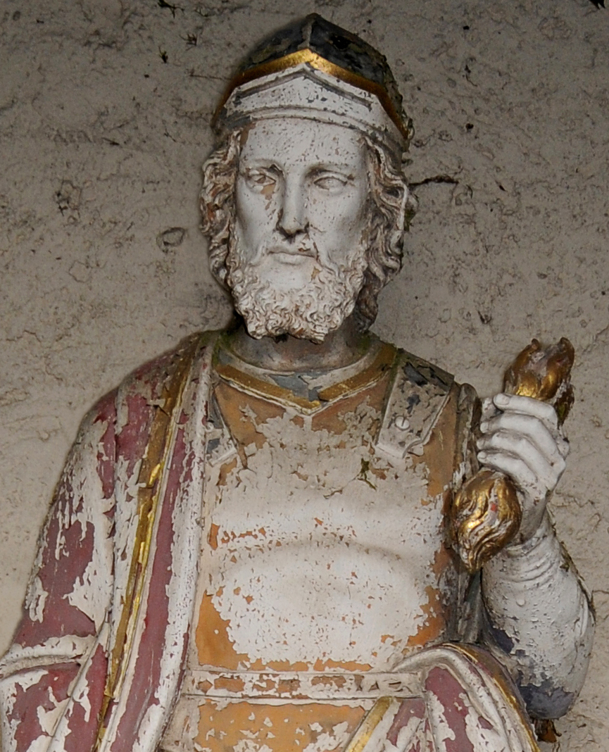 Siren, Statu vum Donatius.